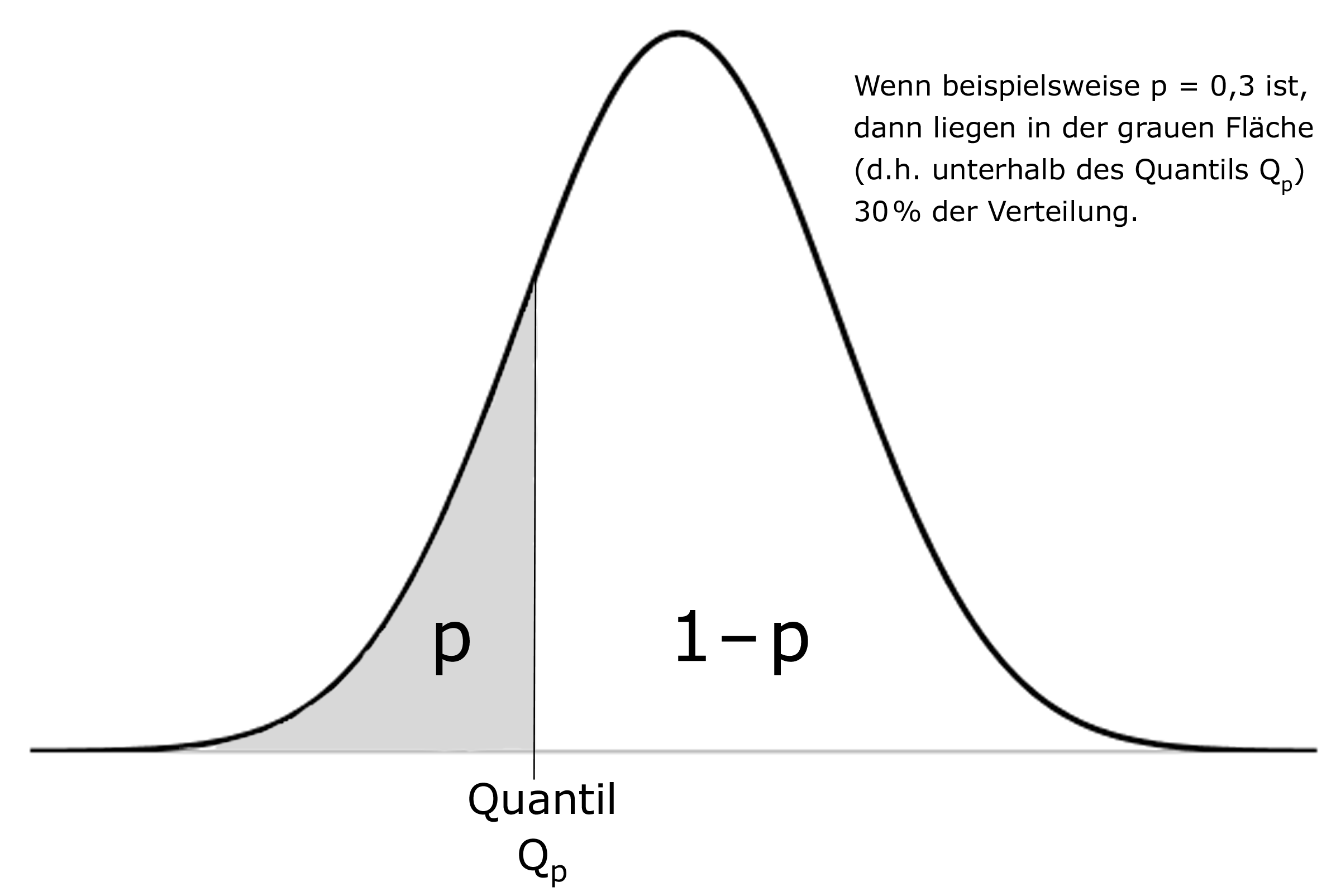 Normalverteilung mit einem Quantil Q(p)